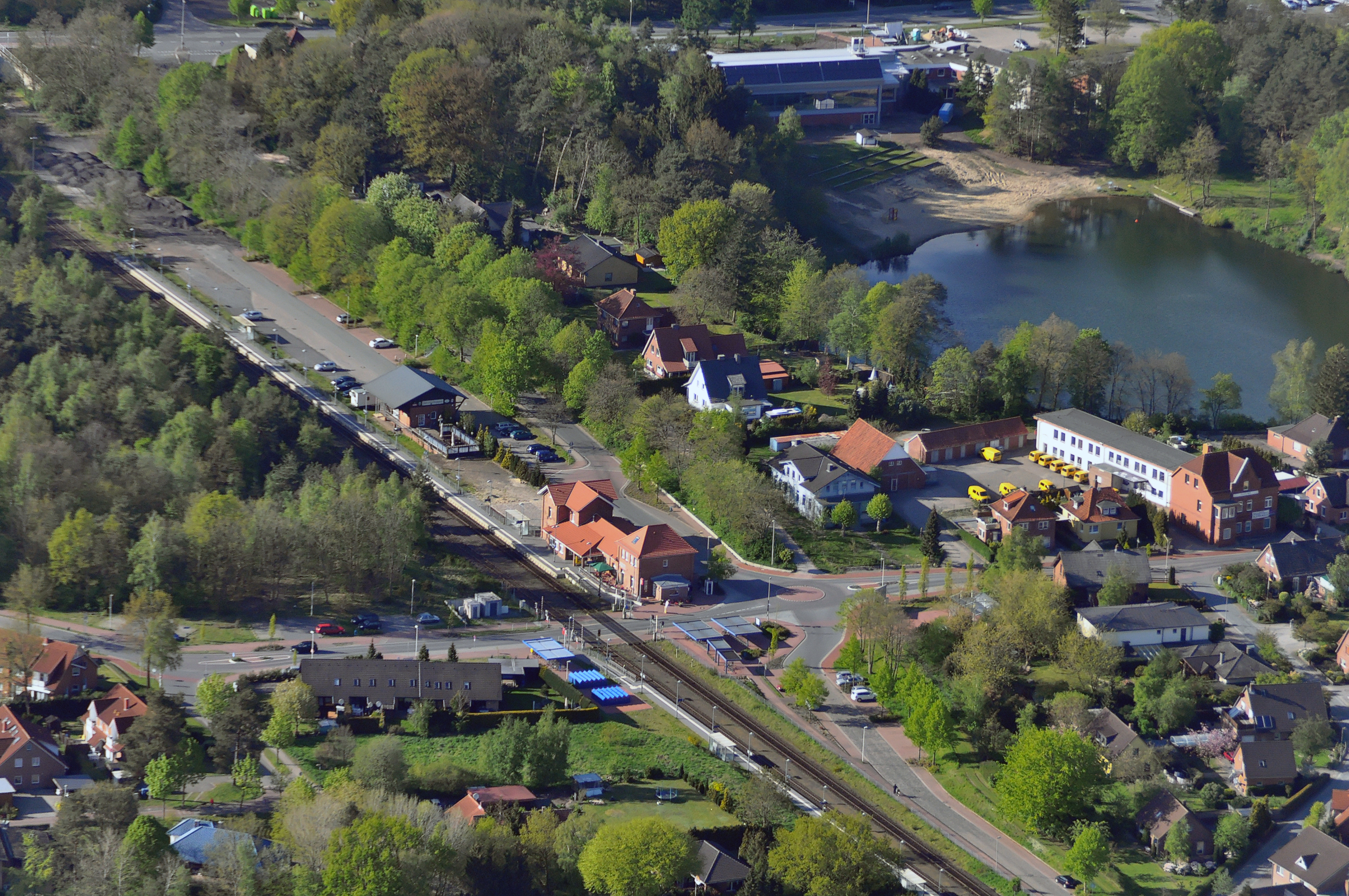 Luftbilder von der Nordseeküste 2012-05. Hemmoor, rechts das Heidestrandbad, Blick nach Norden